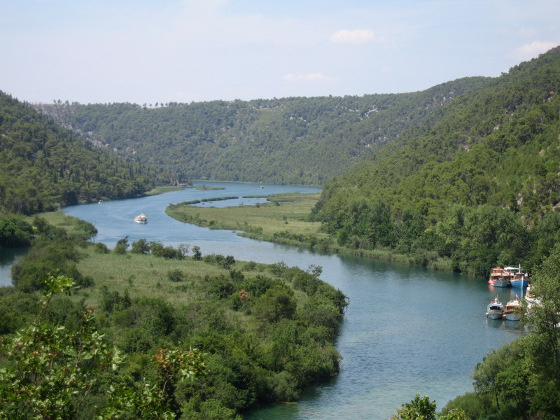 National park Krka